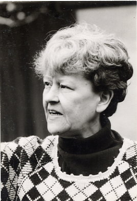 Portrai von Brigitte D'Ortschy